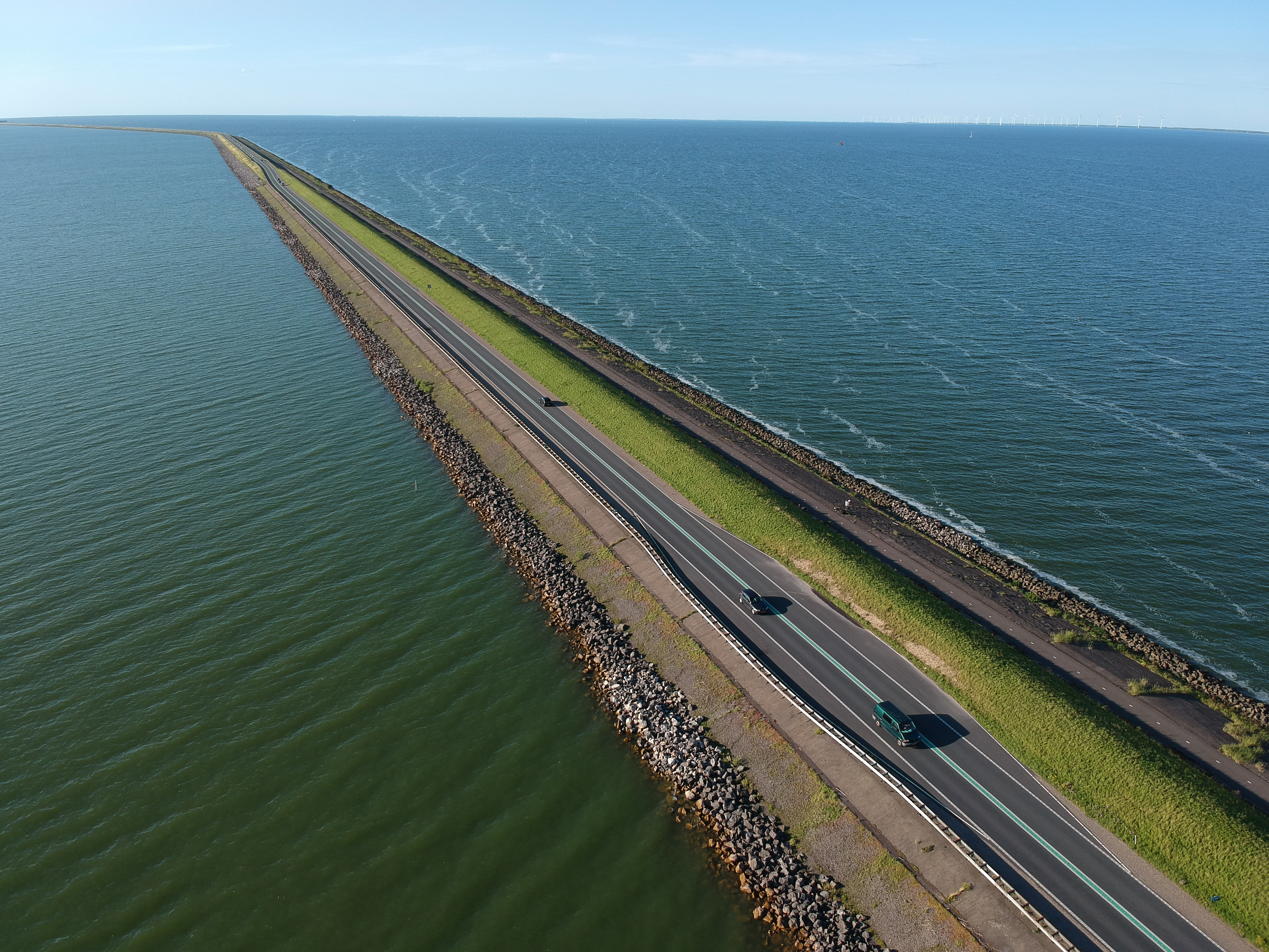 Houtribdijk, genomen zo'n 10km onderweg van Lelystad - Enkhuizen, direct na de knik het IJsselmeer/Marketeer op.